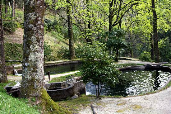 Amarante Ansiães Viveiro de Trutas